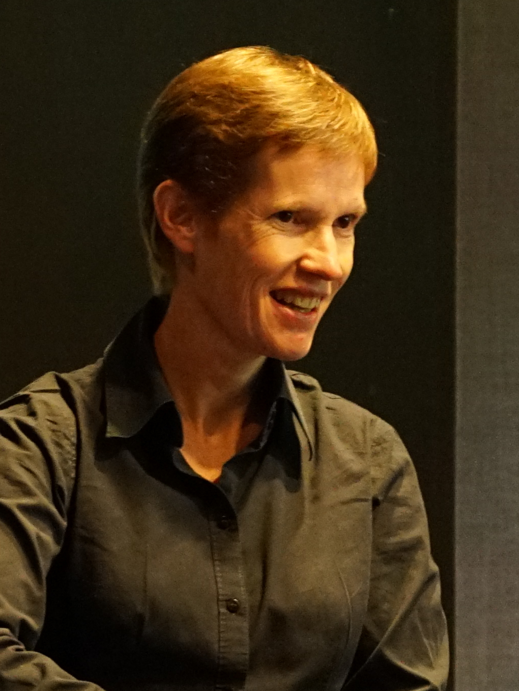 en conférence à Reims.